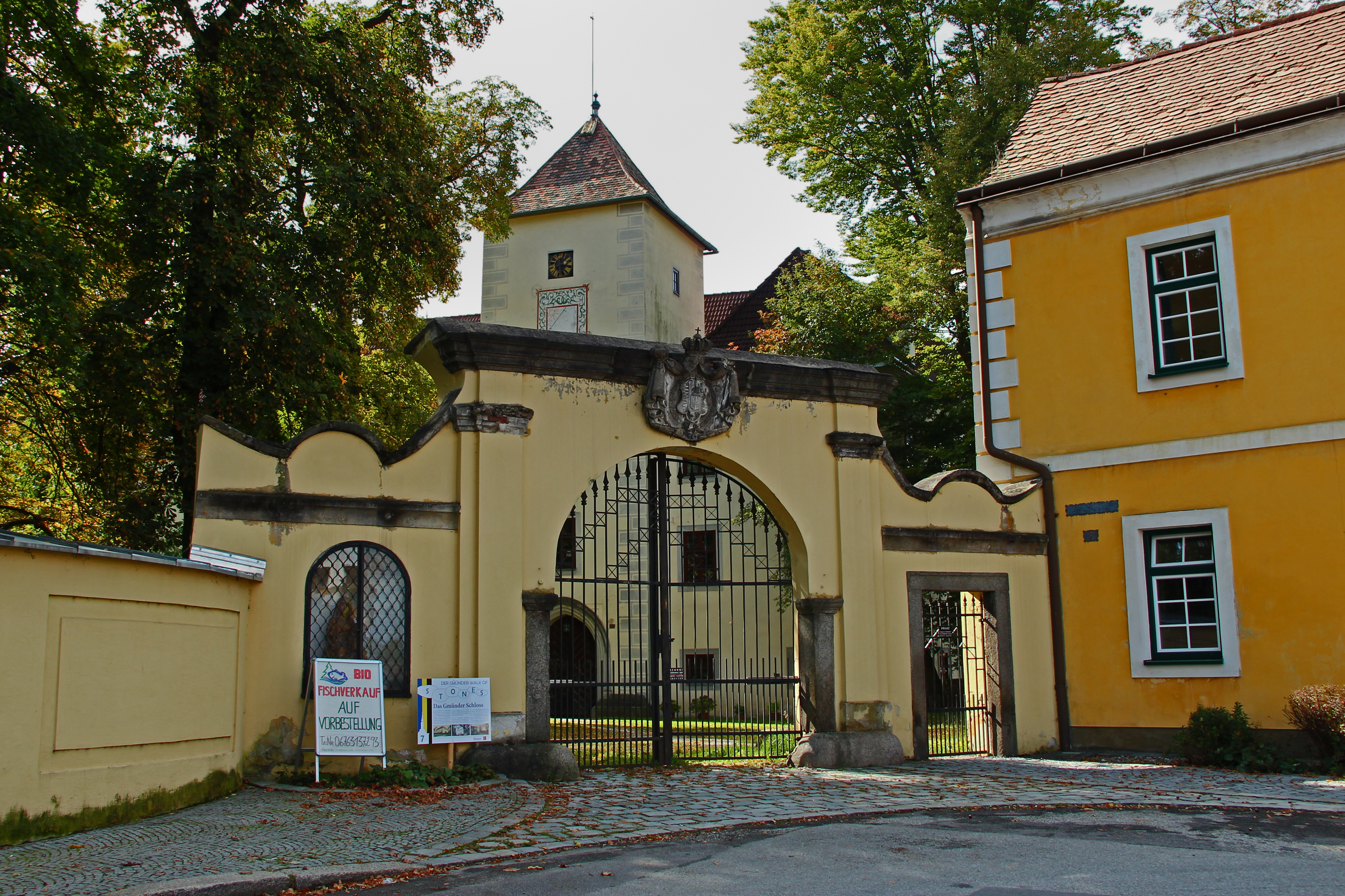 Gmünd - Denkmalpfad - Schloss Gmünd Das im Kern romanische Schloss wurde im 17. Jahrhundert zur Vierflügelanlage erweitert. Dorothea von Liechtenstein stiftete 1382 die Schlosskapelle. Dieses Bild wurde anlässlich des österreichischen Tags des Denkmals 2012 in Niederösterreich eingereicht.